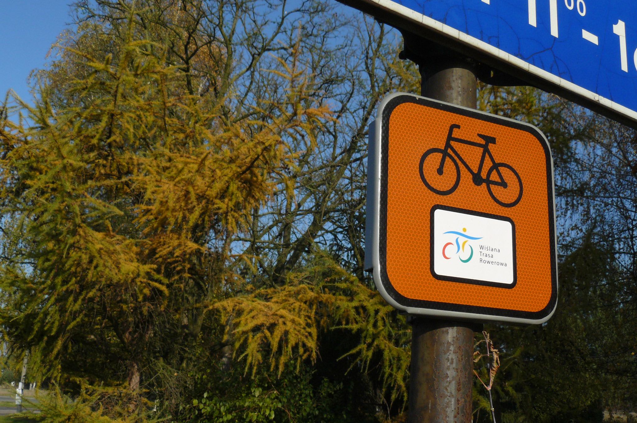 Kaszczorek. Wiślana Trasa Rowerowa.